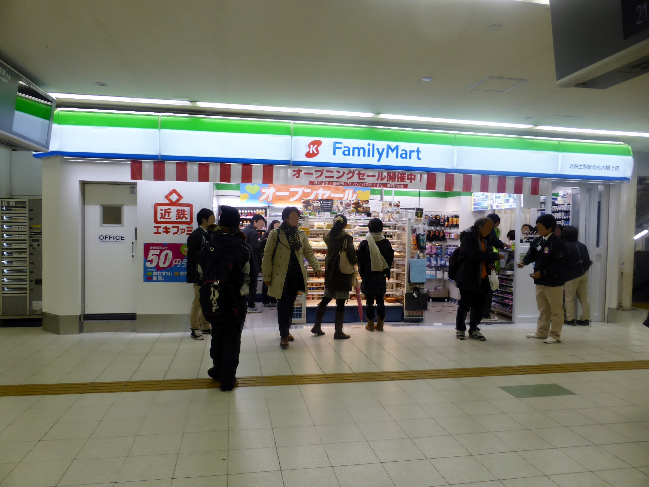 ファミリーマート近鉄生駒駅改札内橋上店を撮影。